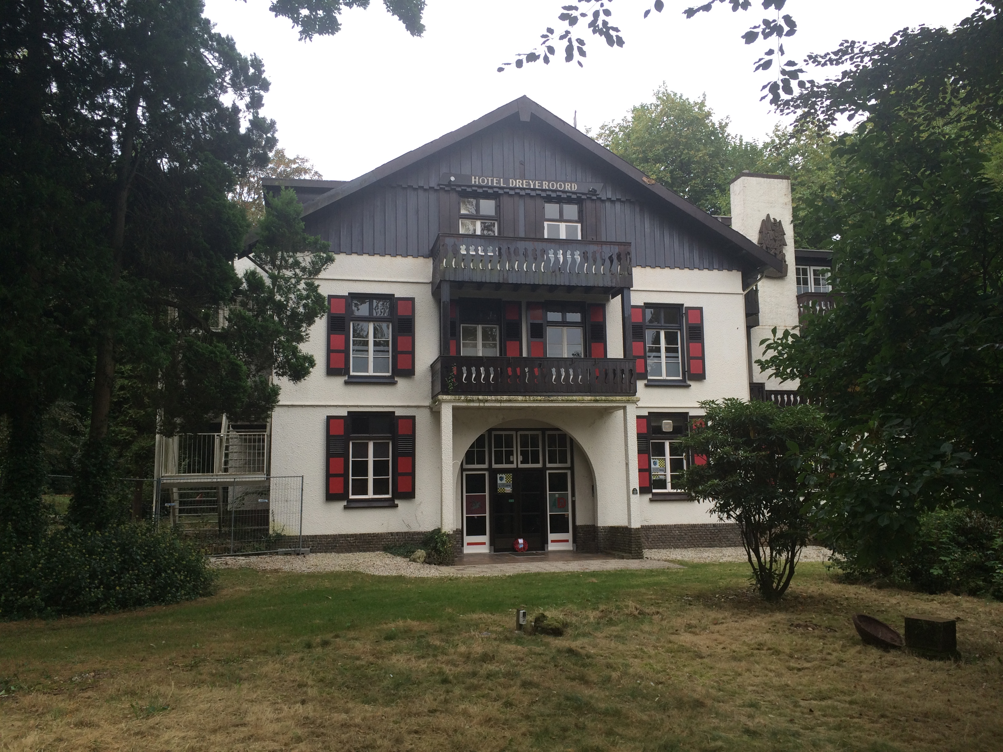 Voormalig hotel Dreijeroord in september 2016. Foto: J.J. Bats